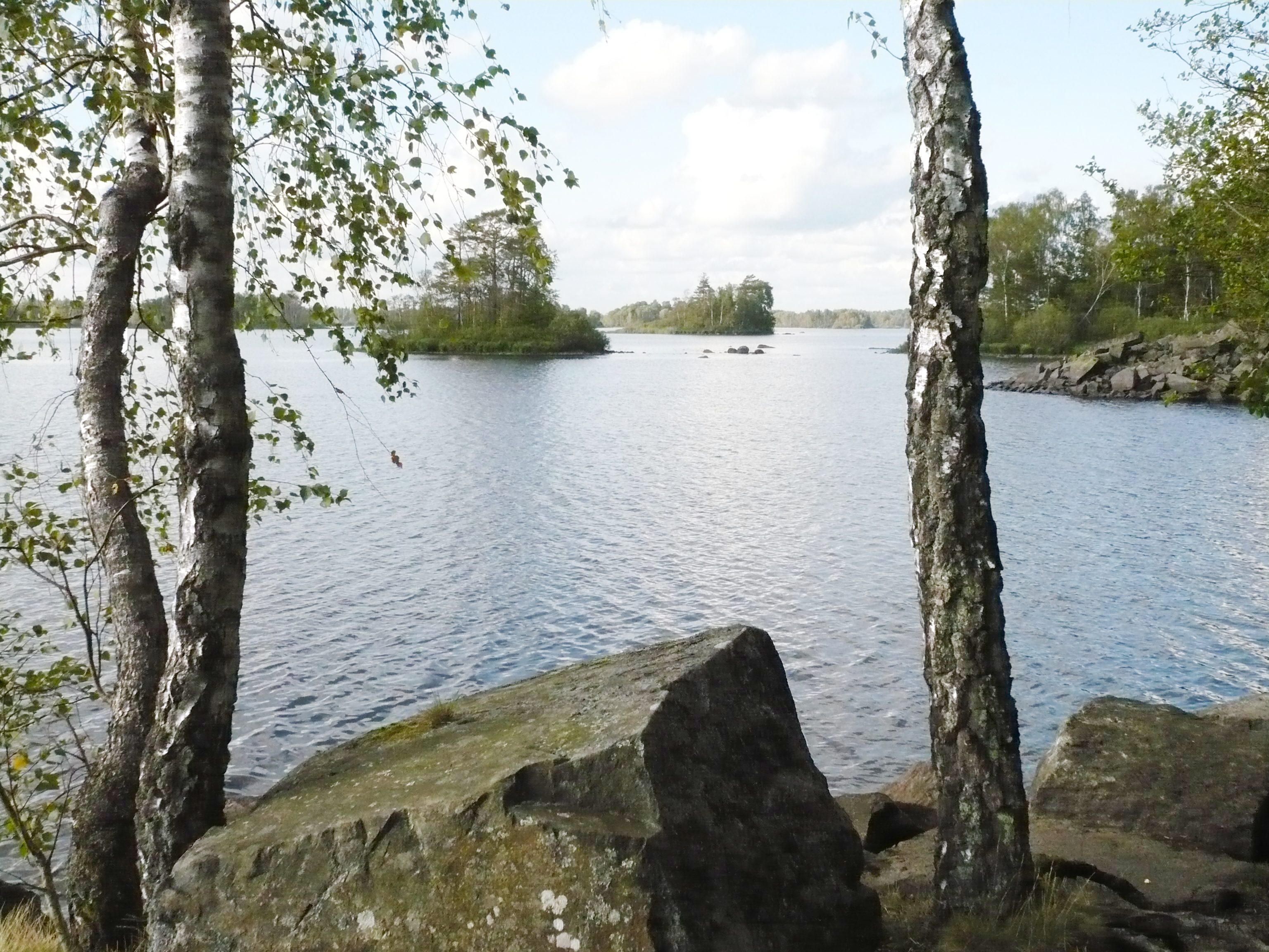 Taxås naturreservat, Möcklen